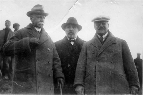 גניגר - לורד פלומר, סיר אלפרד מונד ומנחם אוסישקין.